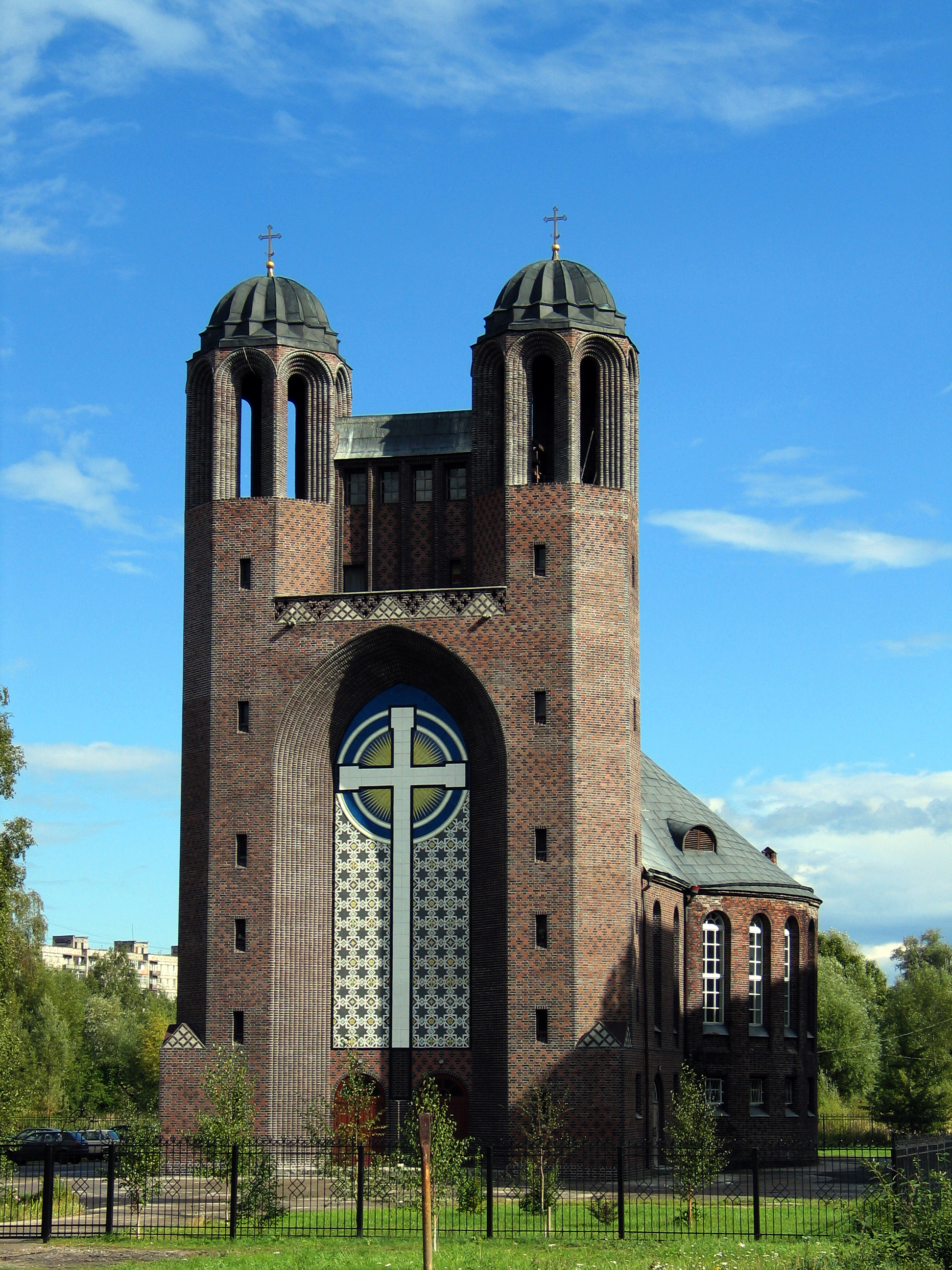 Креcтовоздвиженский собор в г. Калининград